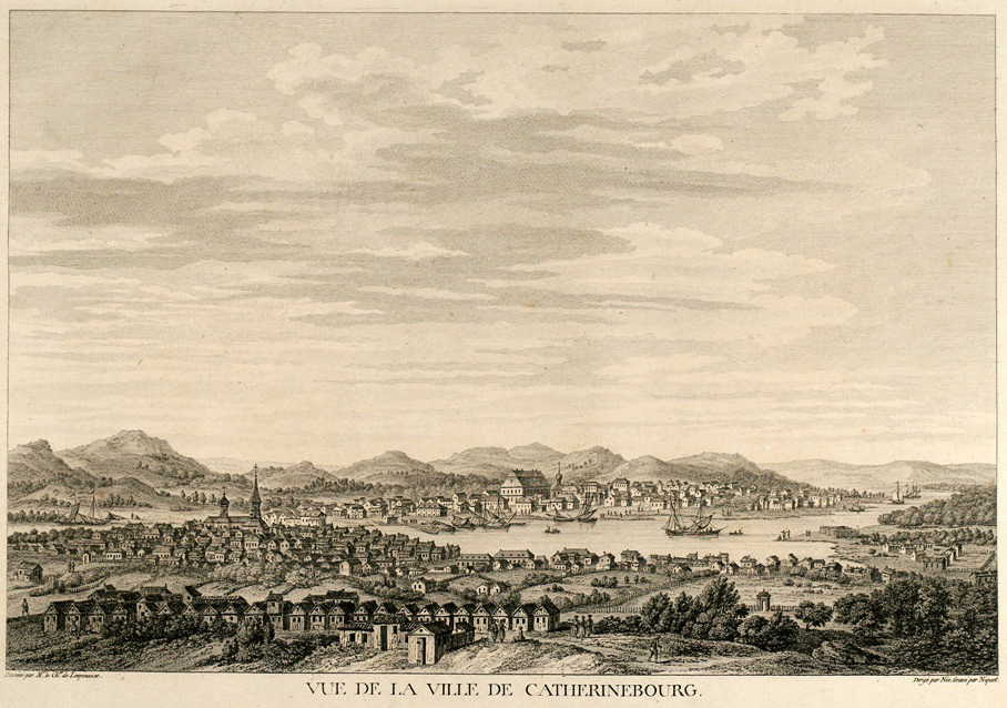 Вид города Екатеринбурга (1768–1784 гг.) Офорт из парижского атласа А.Ф. Ле Клерка «Физическая, моральная, гражданская и политическая история современной России» (1768–1784)